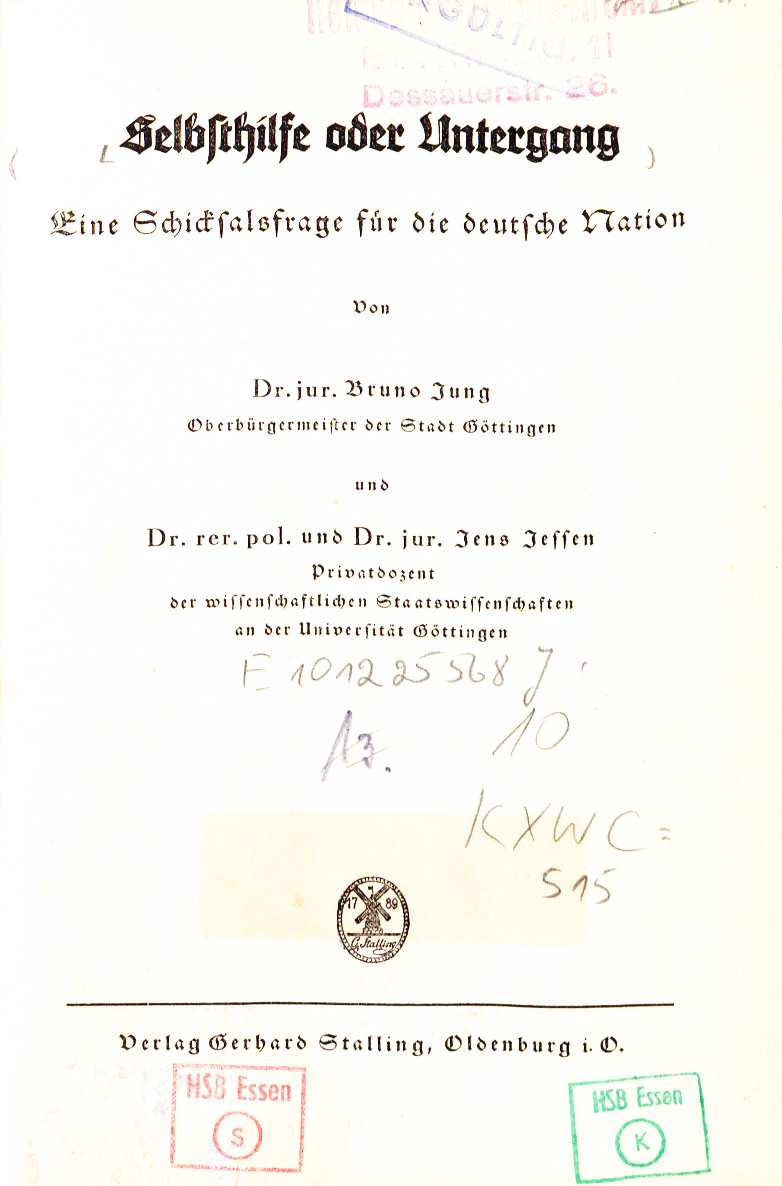 Bruno Jung Jens Jessen Selbsthilfe oder Untergang 1931 Titel